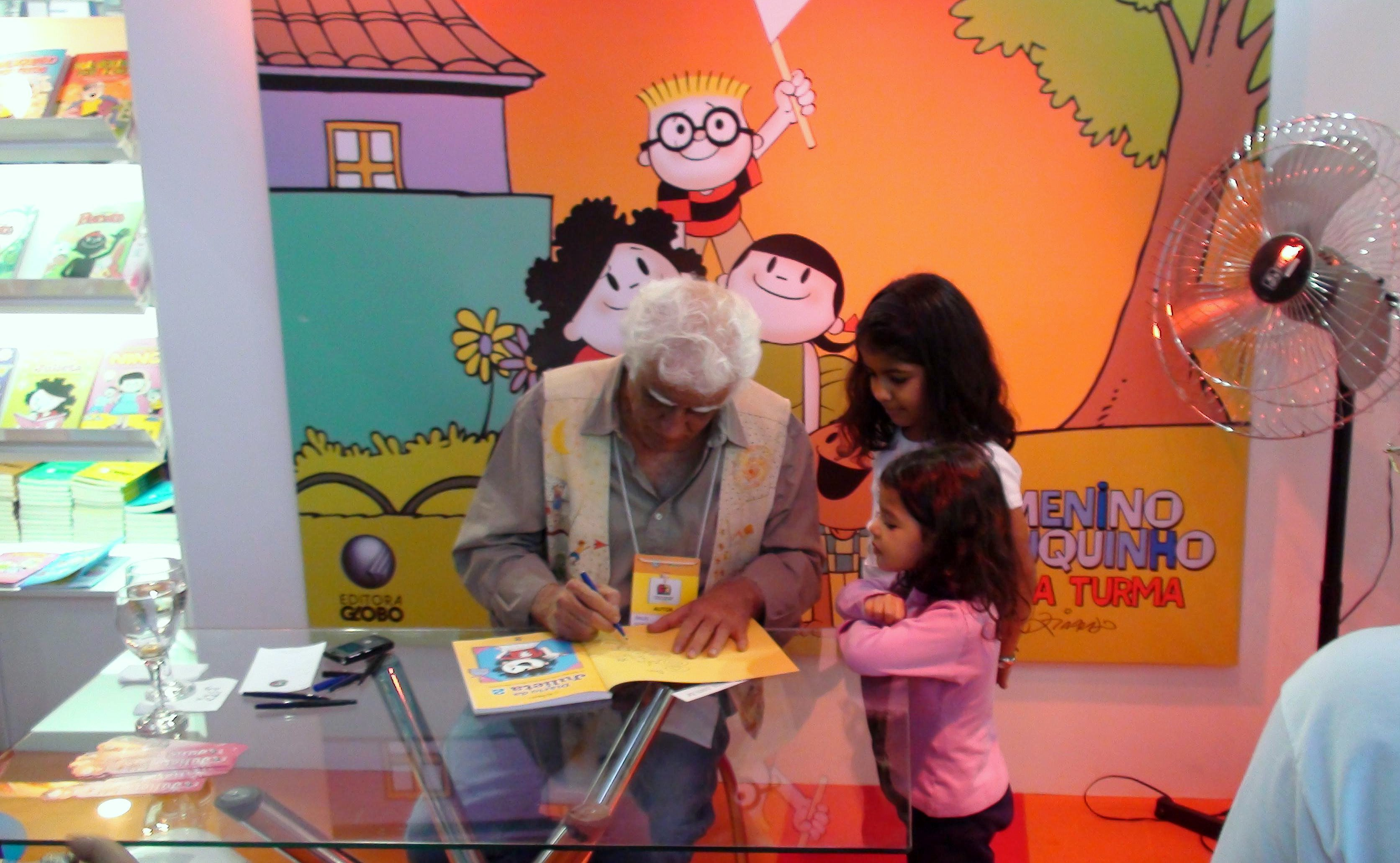 O escritor brasileiro de livros infantis Ziraldo concedendo autógrafos de seus livros na 20º Bienal do Livro de São Paulo que aconteceu em 2008 no Complexo do Anhembi na cidade de São Paulo.